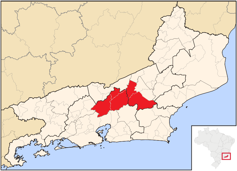 Localização das cidades de Petrópolis, Teresópolis, Sumidouro e Nova Friburgo; atingidas fortemente pela chuva na Região Serrana do estado do Rio de Janeiro em Janeiro de 2011.